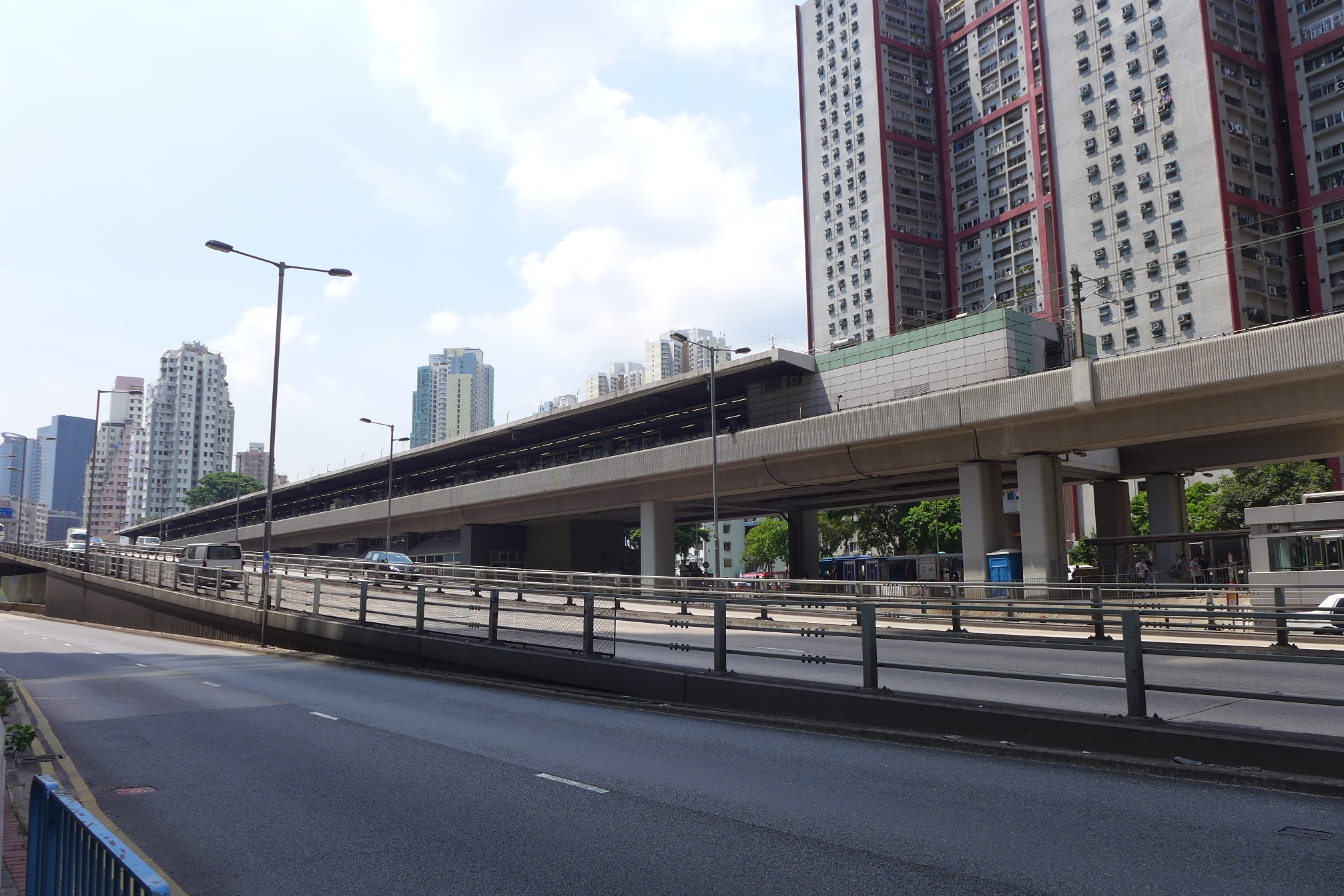 Nagu Tou Kok Station